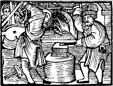 Wie Seyfrid zu eynem Schmid kam vnd den Ampoß in die erden schlug vnd das eysen entzwey, vnd den meyster vnd knecht schlug.